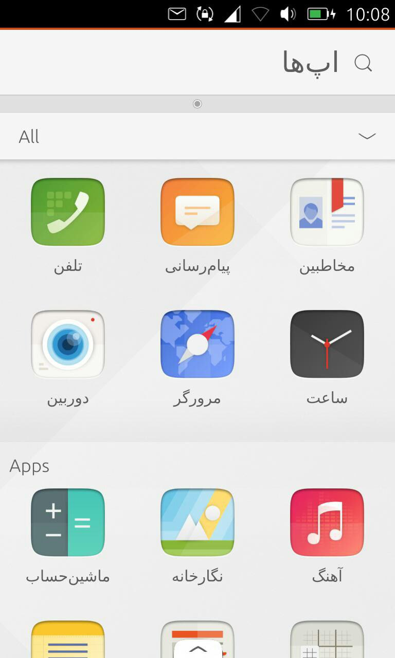 صفحهٔ خانگی اوبونتو تاچ در حال نمایش کاره‌ها